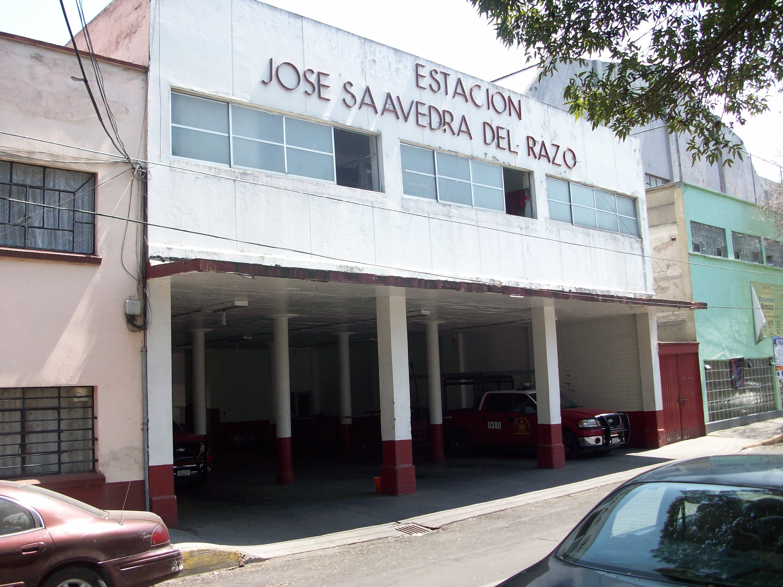 Estacion de Bomberos GAM